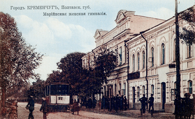 Postcards of old Kremenchuk. Маріїнська жіноча гімназія.